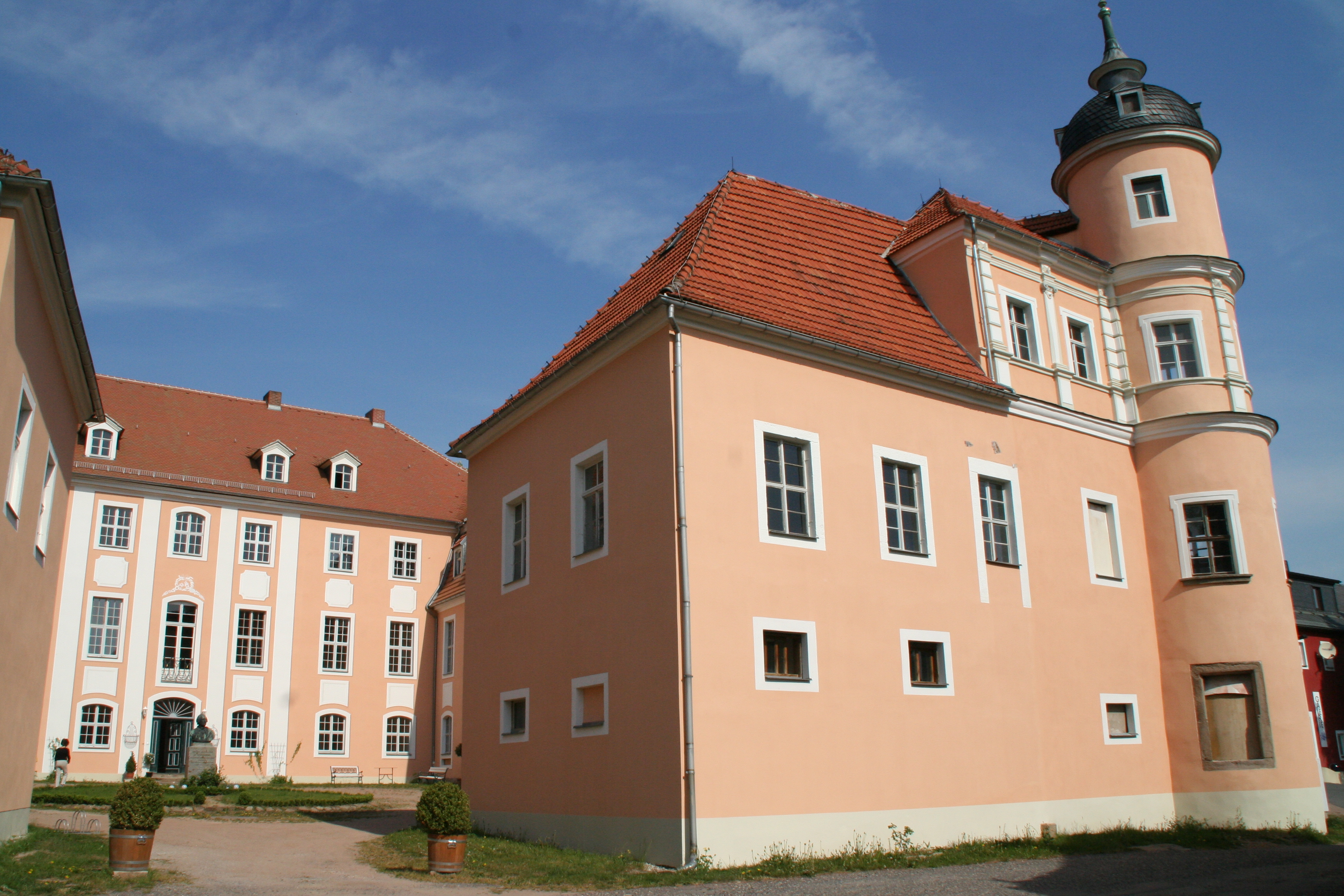 Hofseite von Schloss Reichstädt